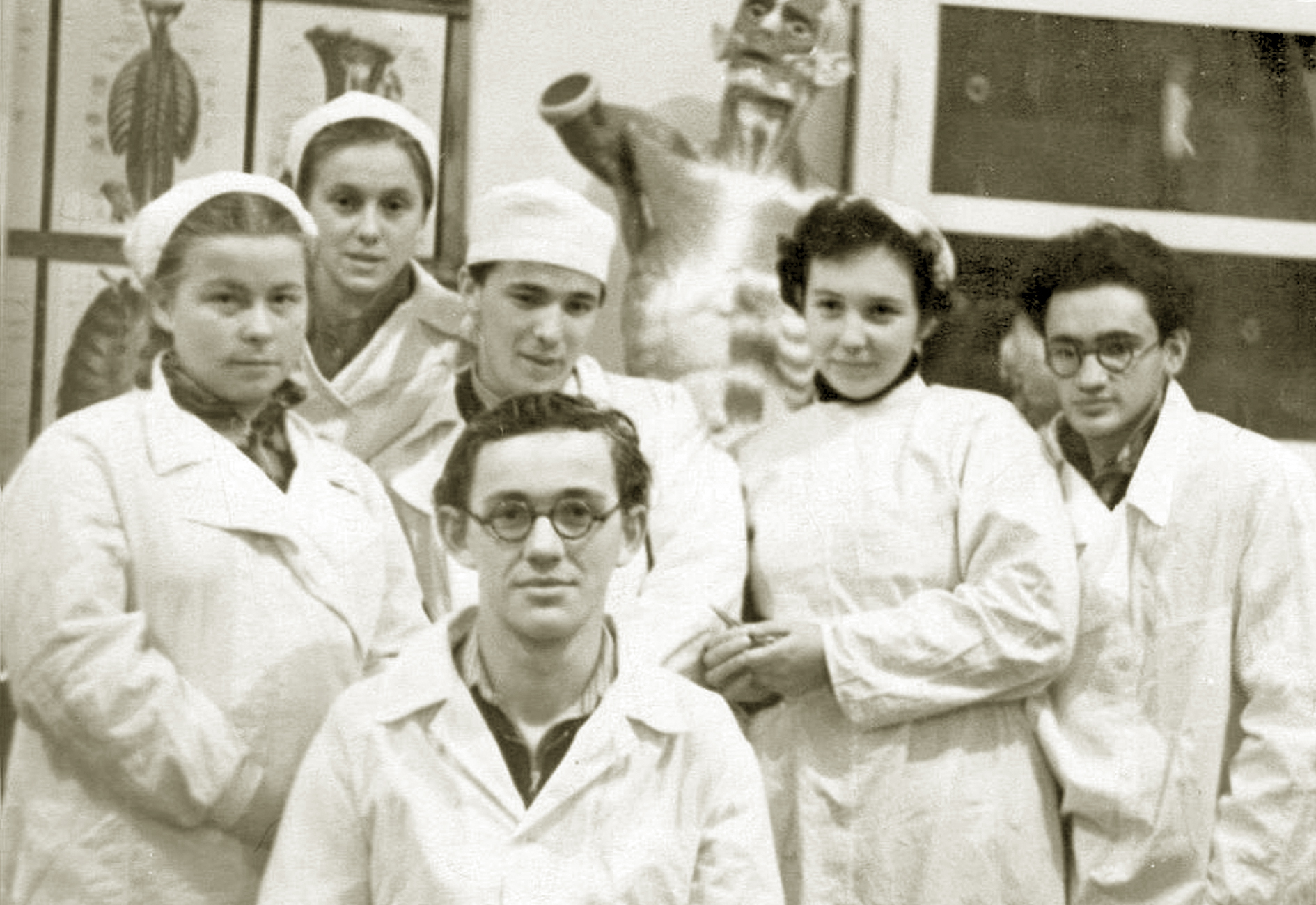 Профессора Э. К. Цыбулькин и Н. П. Шабалов в студенческие годы